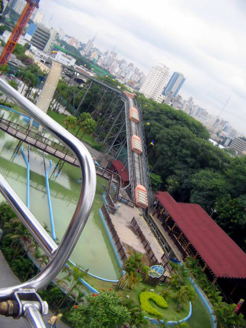 Atração Waimea do parque brasileiro "Playcenter" vista do alto.